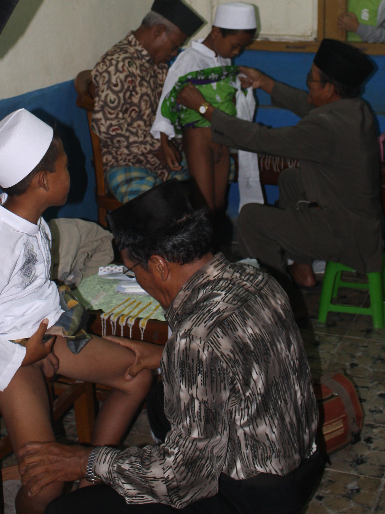 Proses khitanan ing talatah Jawa Indonesia